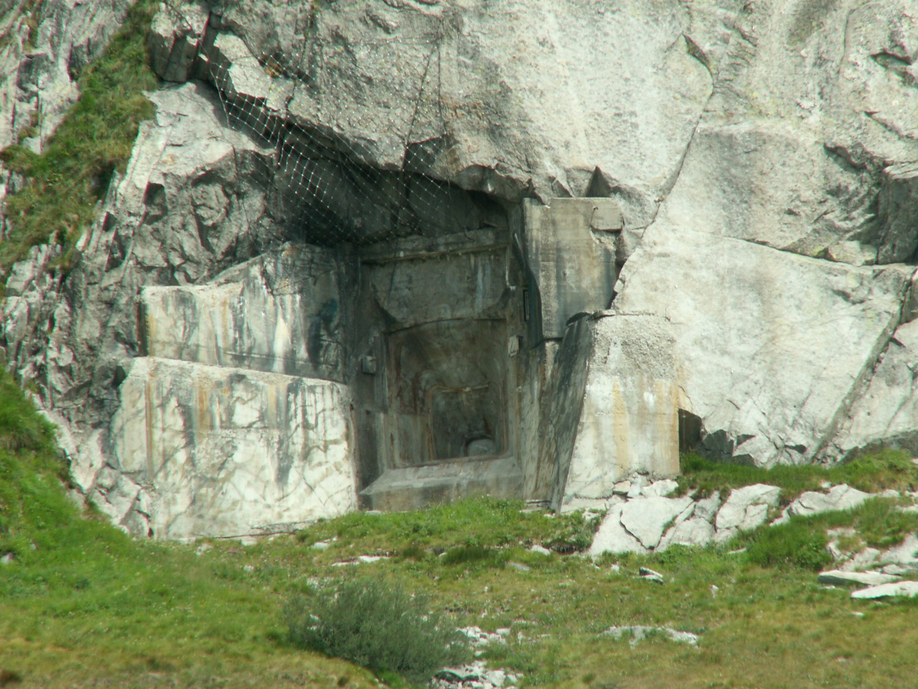 Eine Geschützscharte der 15 cm Kanone